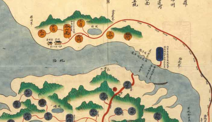 1872년에 발행된 진도 지방 지도의 일부분이며 충무공이 왜적을 크게 무찌른 장소인 "오양탄(嗚洋灘)"이 기재되어 있다. 우수영 경계밖에 있음을 표시하고 있으며 장소는 오늘날의 "전남 해남군 문내면 예락리"이다.